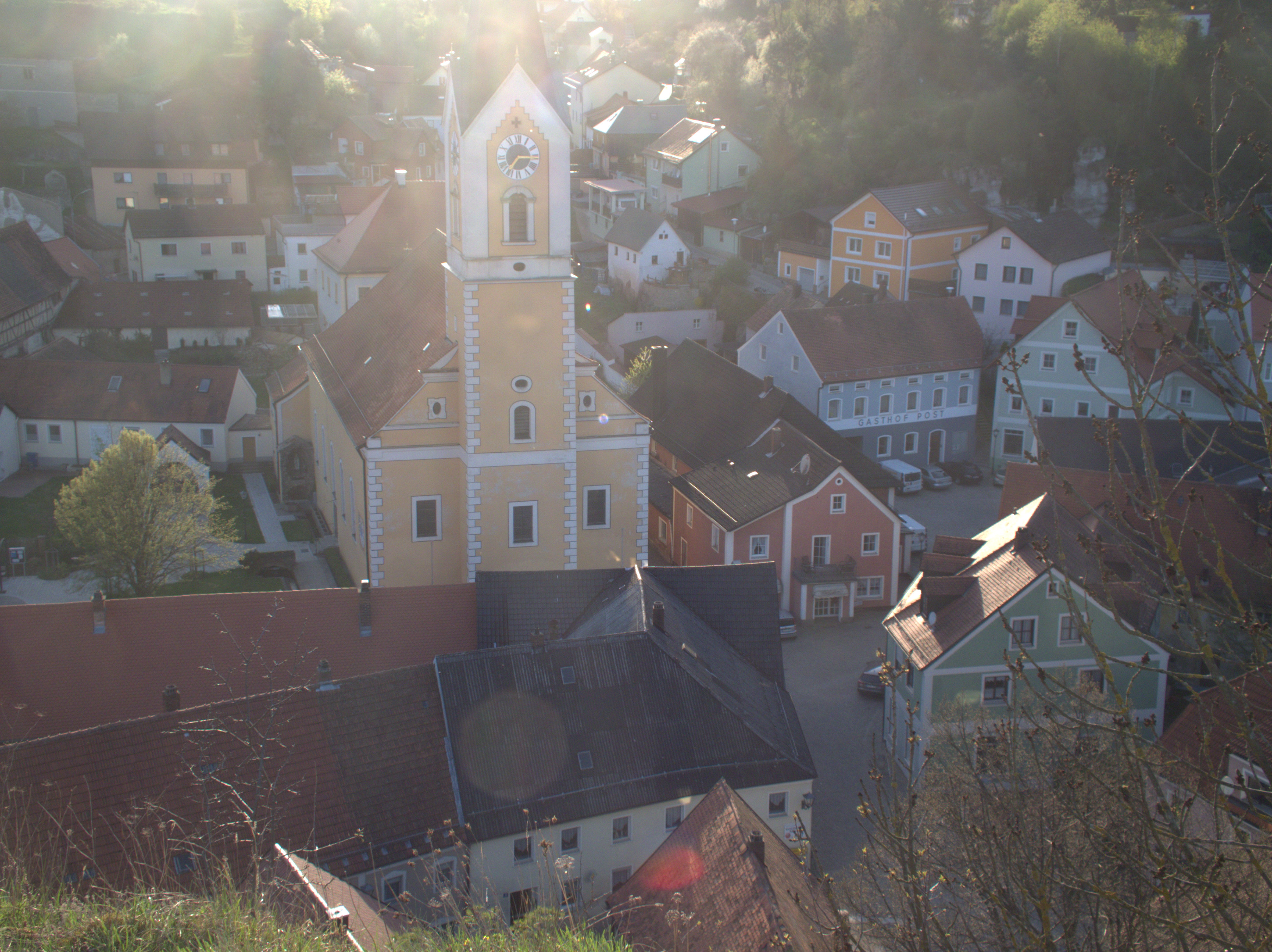 Markt Hohenfels in der Oberpfalz: Blick vom Burgberg zur Pfarrkirche St. Ulrich